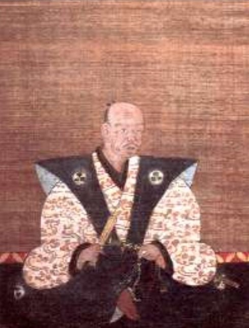 松平清宗の肖像。